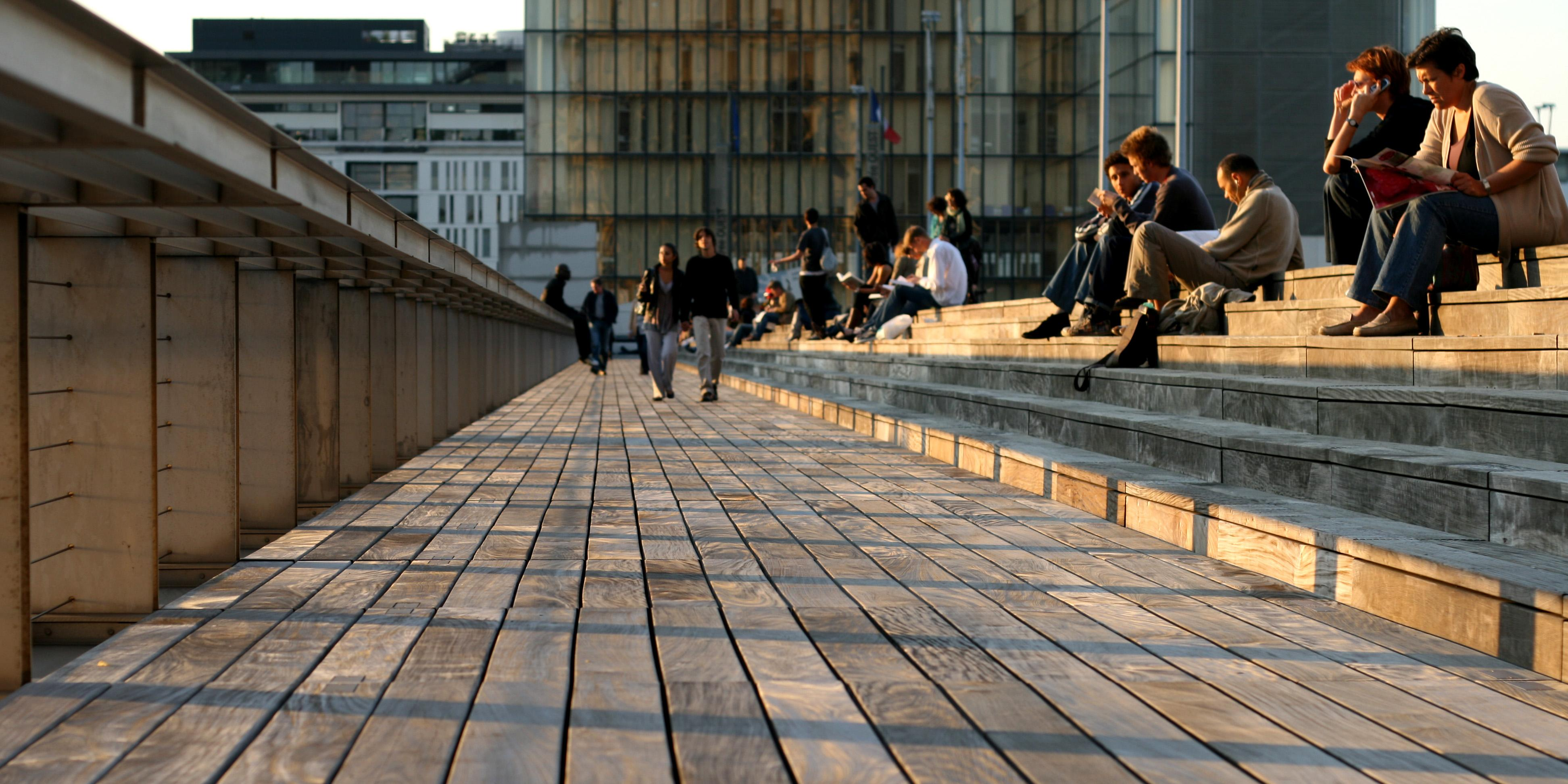 Bibliothèque nationale de France Site Tolbiac